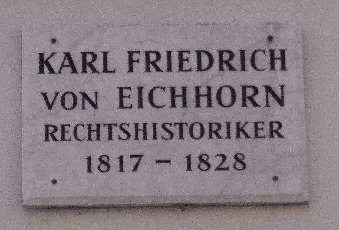 Göttinger Gedenktafel für Eichhorn, Karl Friedrich von (Lange Geismarstraße 49)